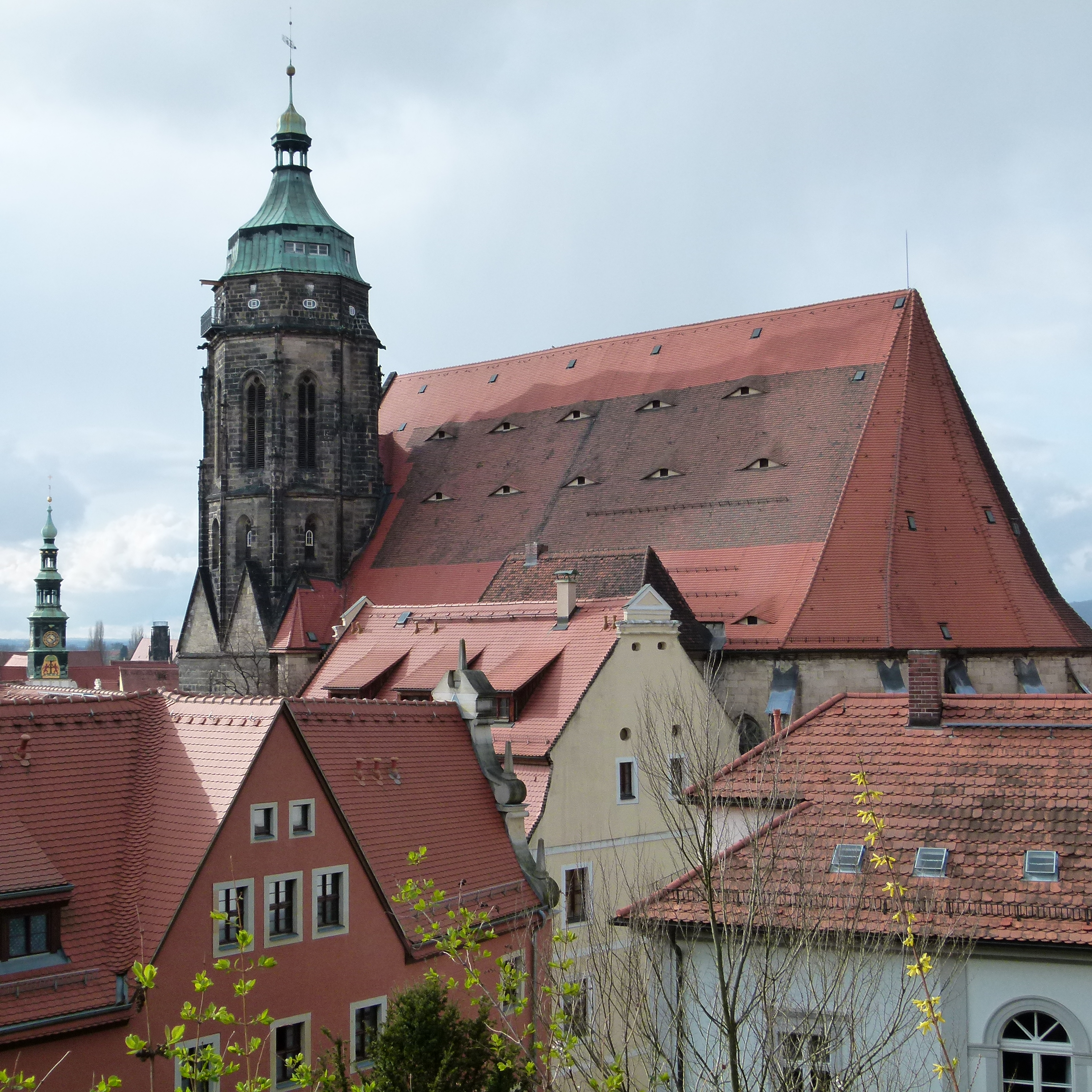 Marienkirche, Kirchplatz 14, Pirna, Sachsen